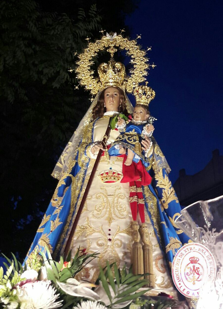 Nuestra Señora de Butarque Coronada, 20 de Mayo.